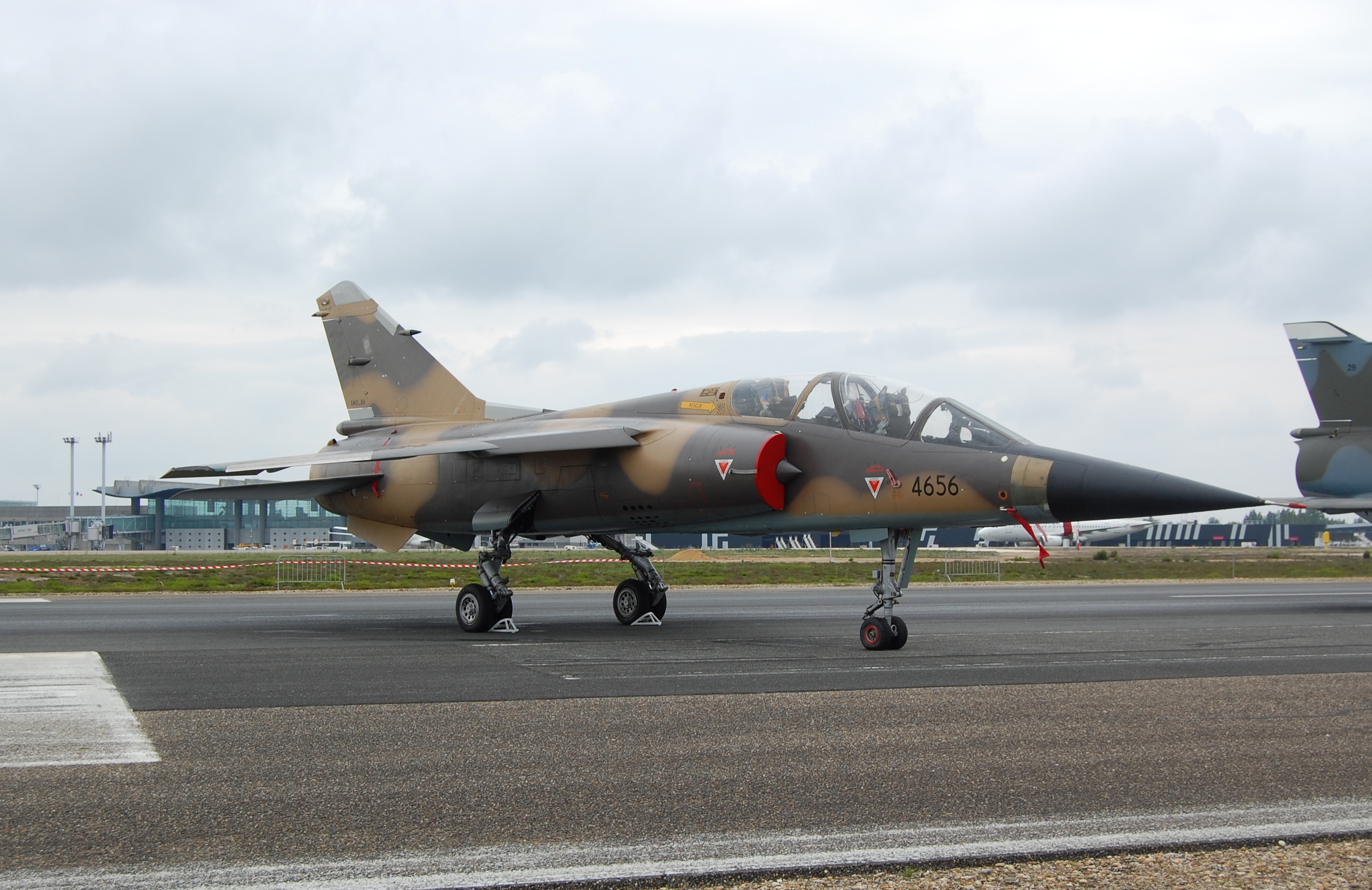 Mirage F1BQ aux 100 ans de l'aéronautique à Mérignac.